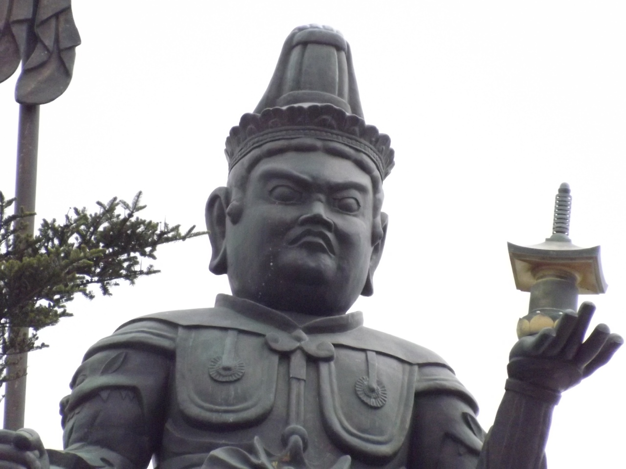 雲辺寺の展望館の毘沙門天